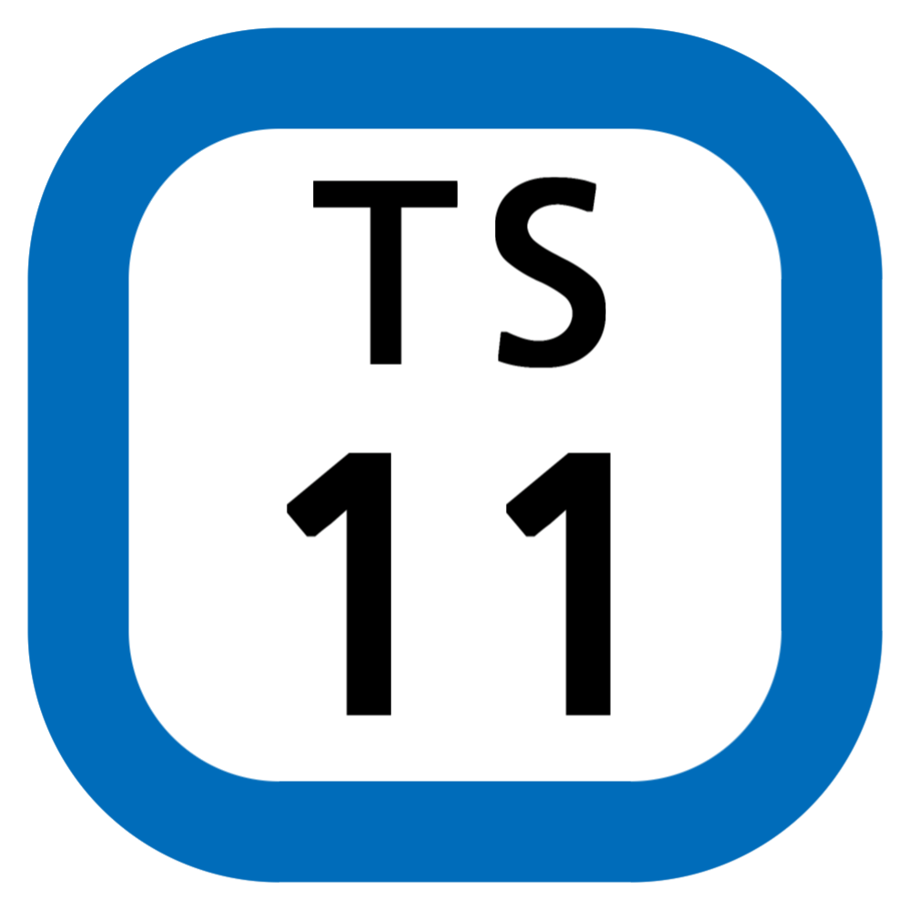 TS-11